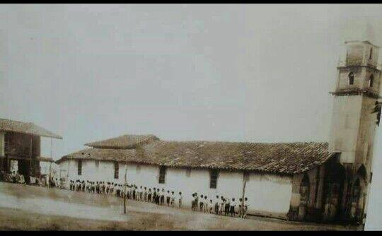 Iglesia Jacinto antes de su remodelación de 1949